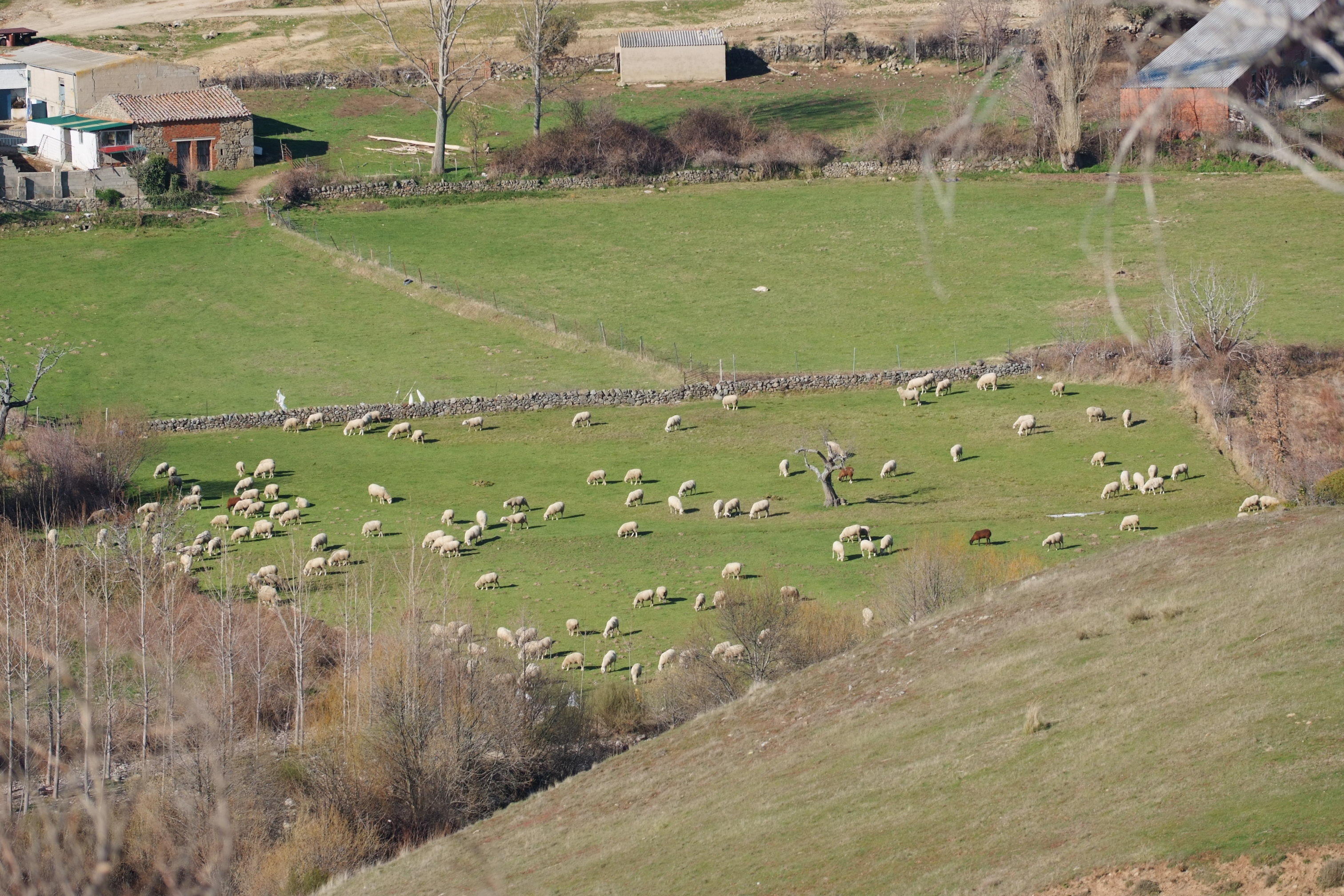 Ganado ovino pastando en Villafranca de la Sierra (Ávila; España).